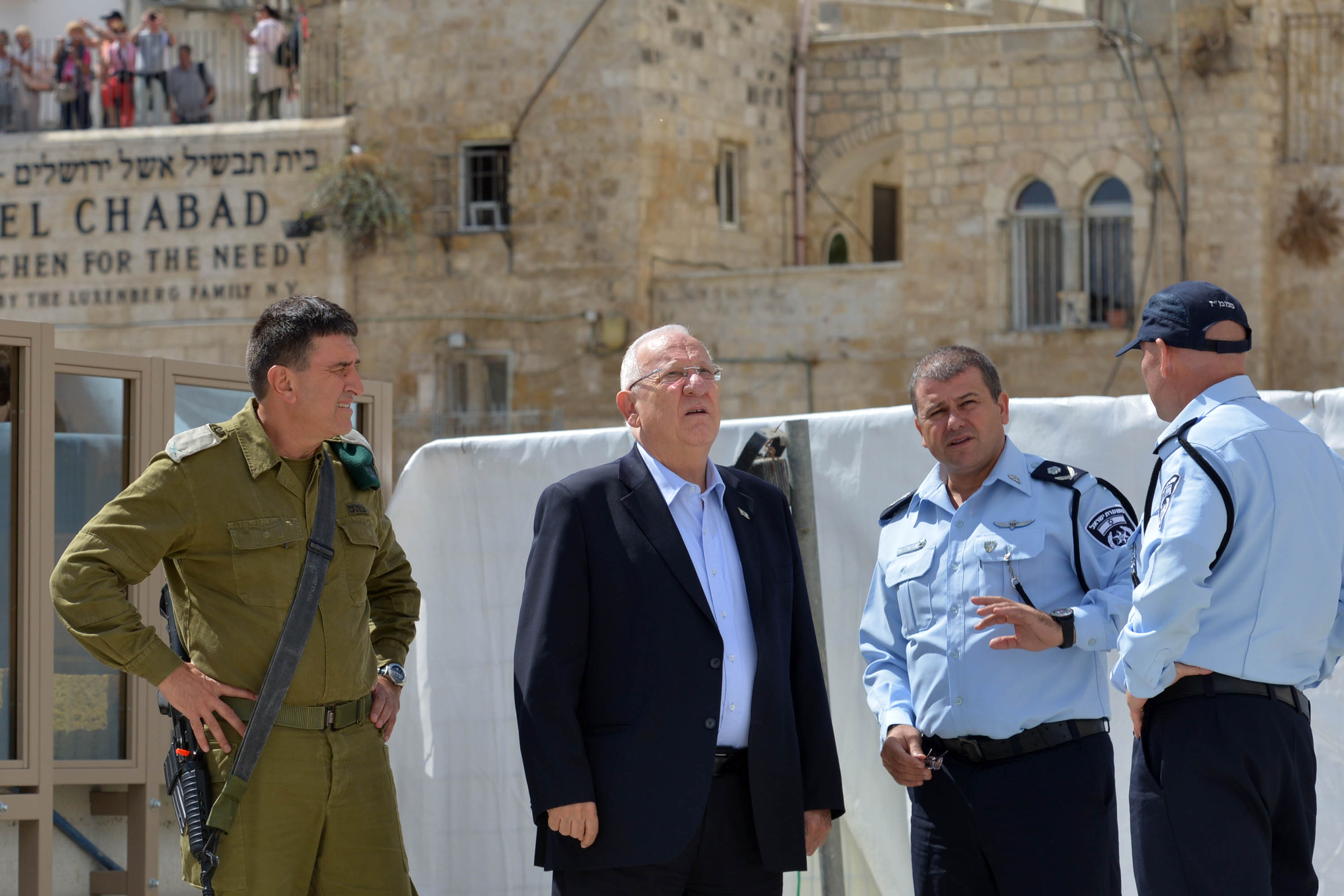 נשיא מדינת ישראל ראובן ריבלין עם ניצב משה אדרי וחסון חסון בביקורו בעיר העתיקה